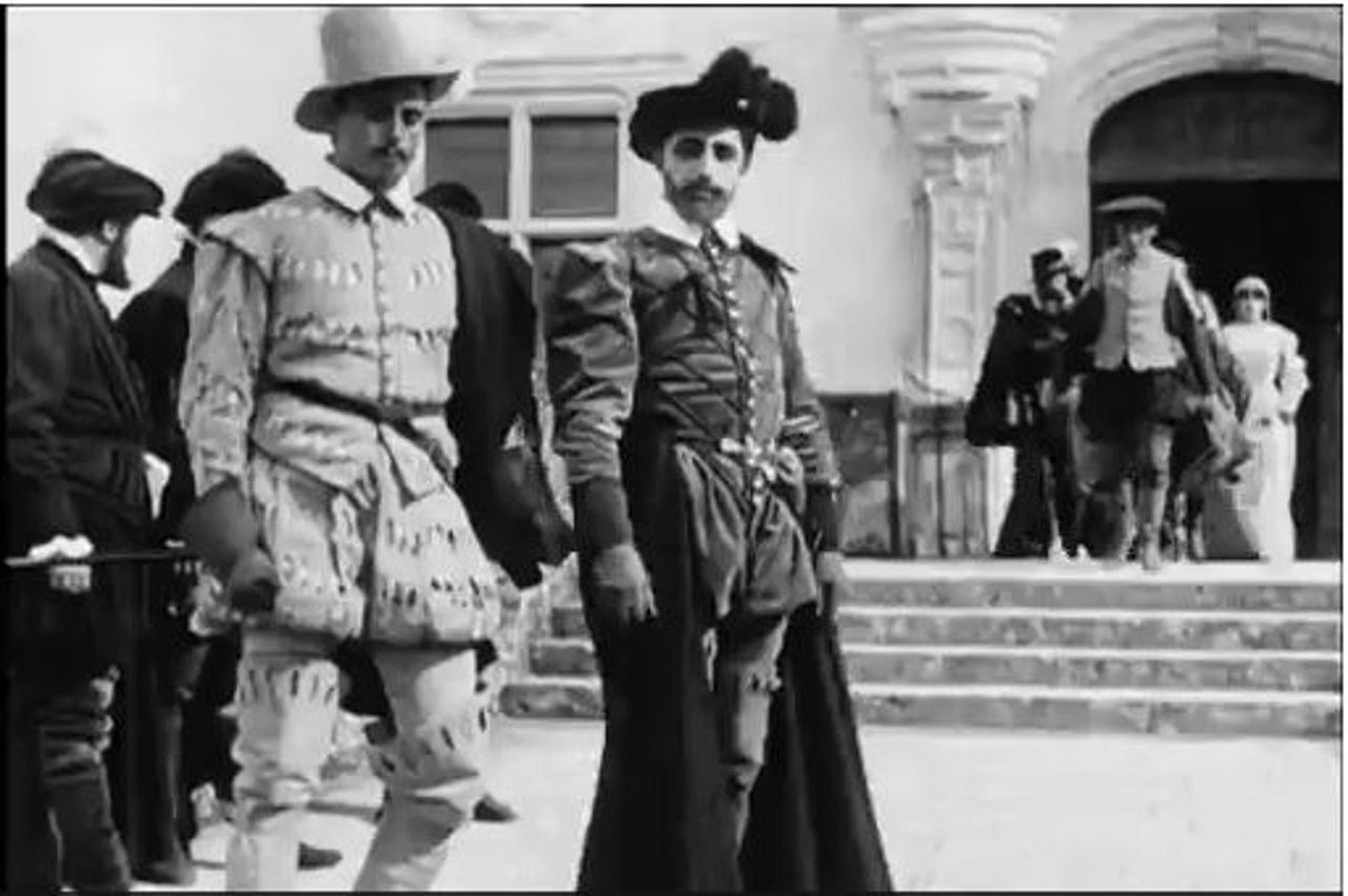 Le réalisateur de cinéma Émile Chautard se sert des extérieurs du château de Chenonceau dans le département de l'Indre-et-Loire pour tourner un film muet, La Dame de Monsoreau, d'après l'œuvre éponyme d'Alexandre Dumas, en 1913.